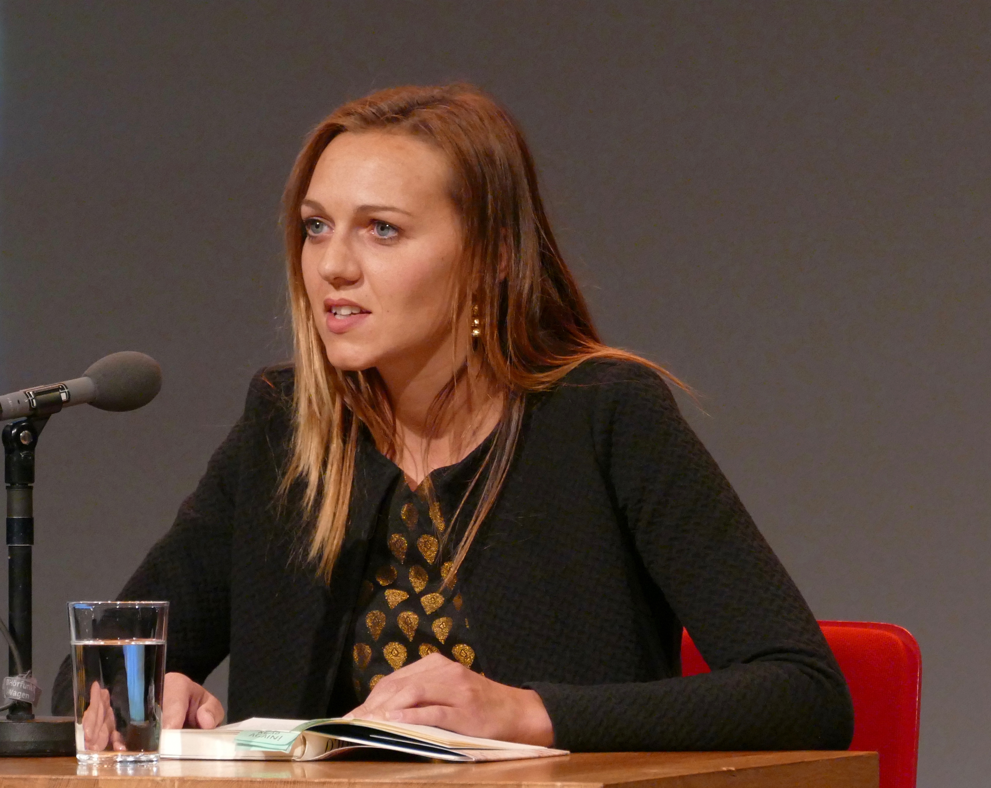 Tanja Raich liest bei den Wortspielen 2019 in München aus ihrem Romandebüt "Jesolo" (Blessing Verlag)